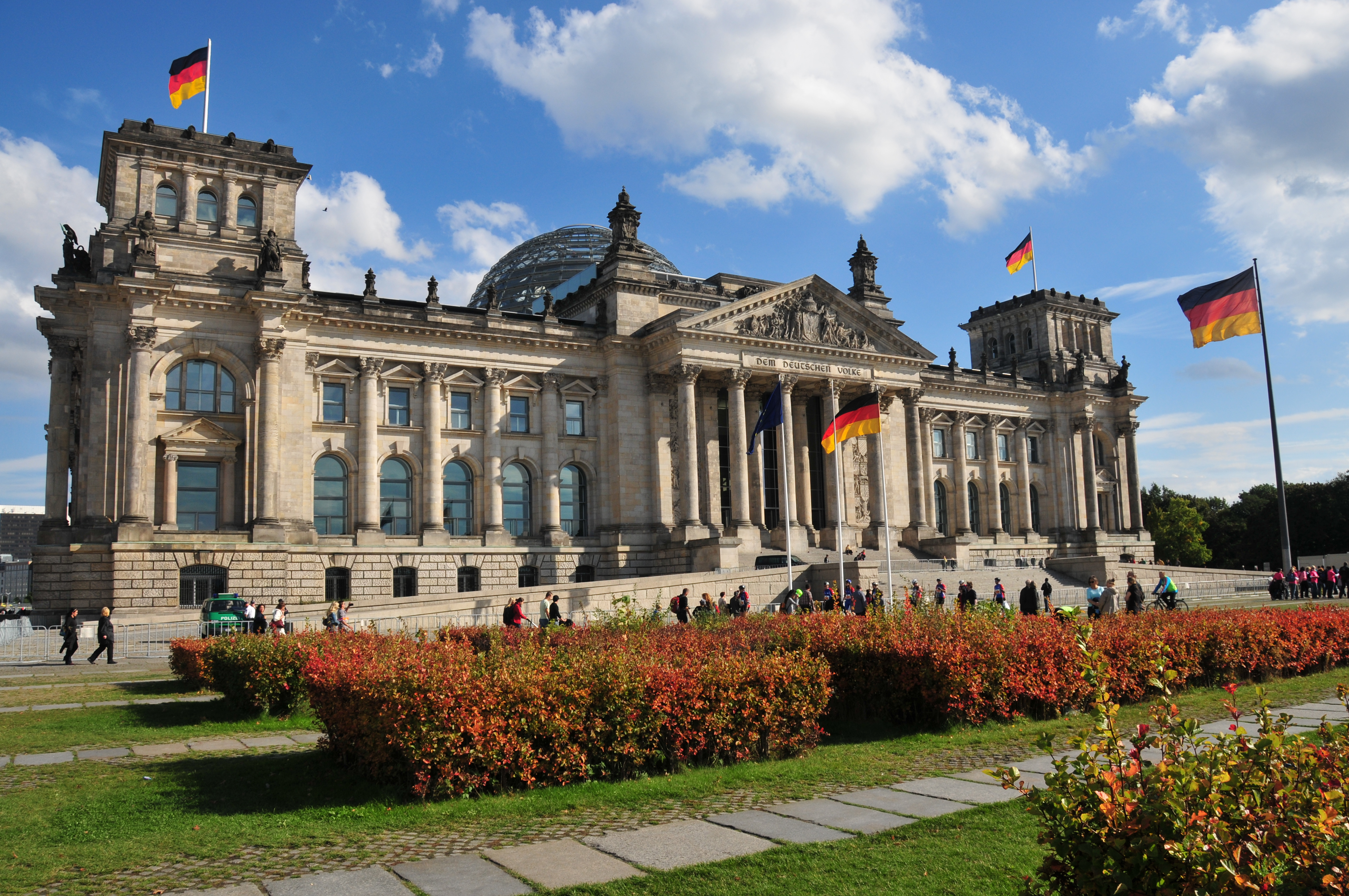 Reichstagsgebäude, Herbst 2012